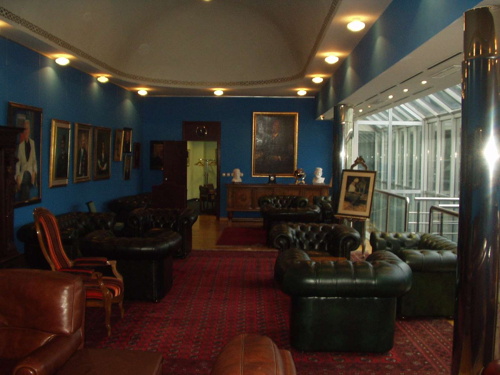 Salon 3